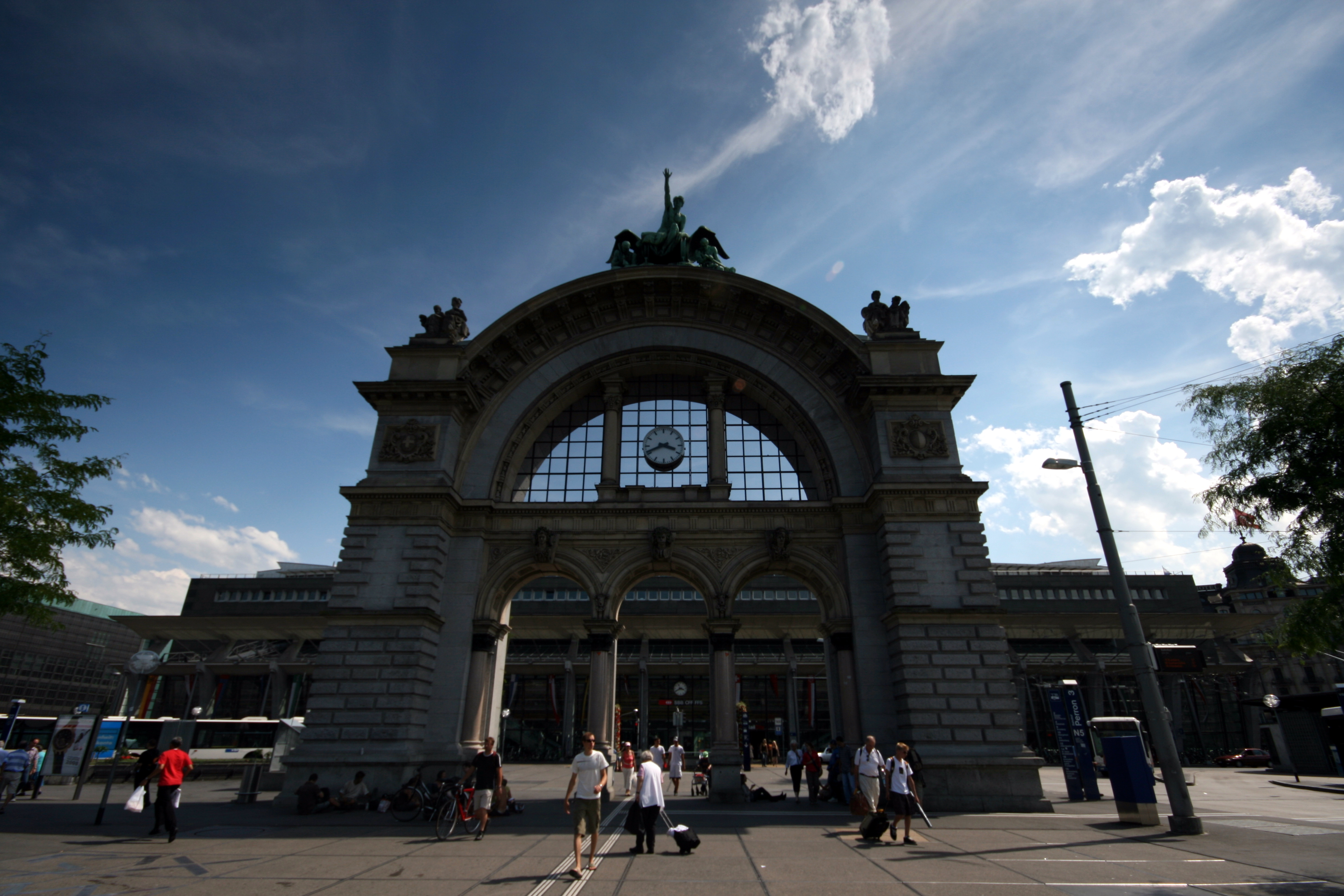 Bahnhoplatz, Lucerne